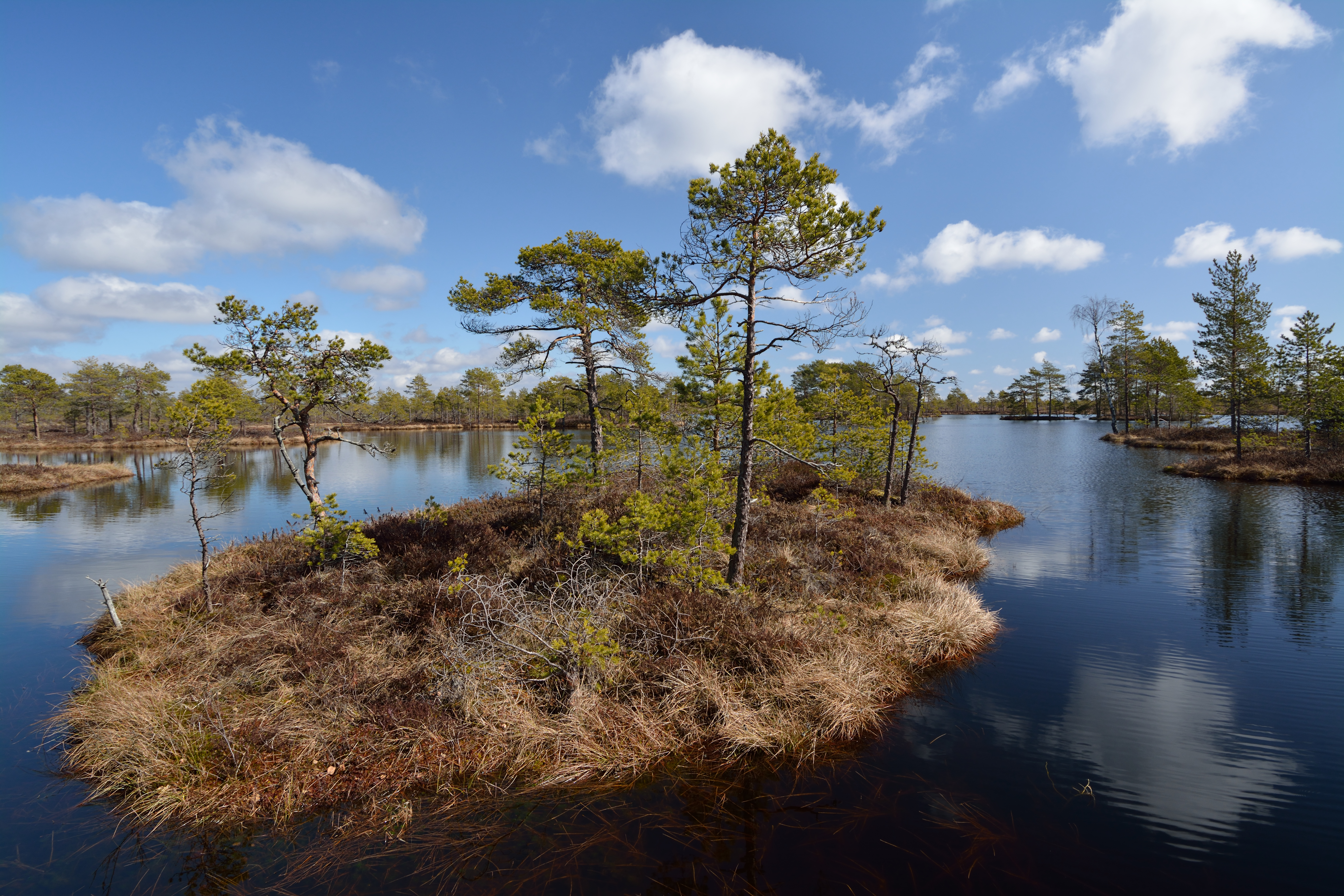 Väike-Loosalu järv